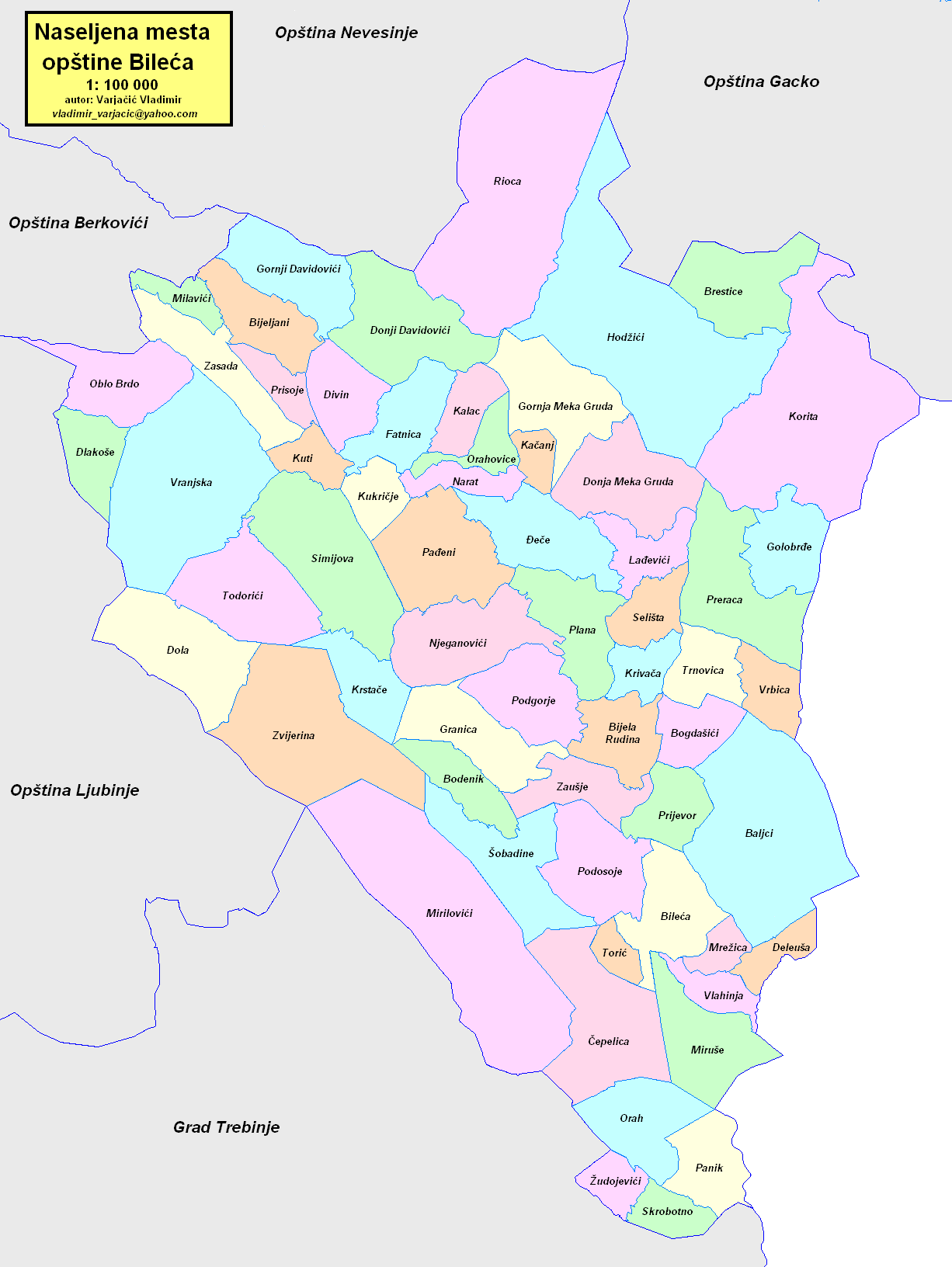 Opština Bileća